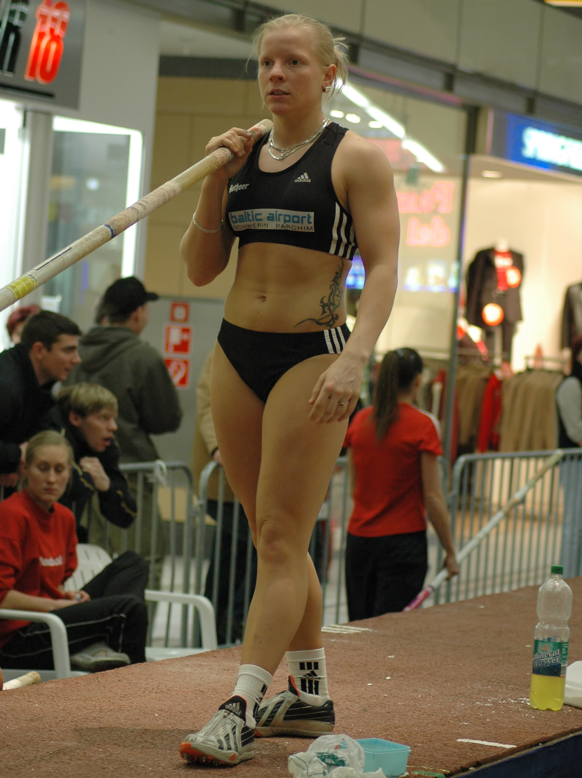 Martina Strutz beim internationalen Stabhochsprungmeeting 2005 im Sterncenter Potsdam Datum 4 Februar 2005 Autor: Frank Wagner